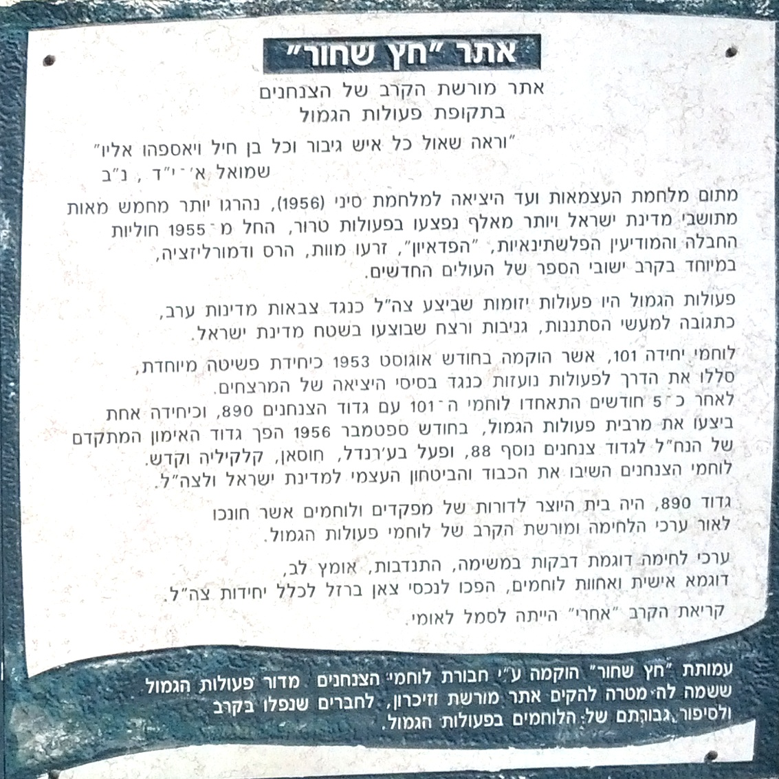 אחד השלטים בכניסה לאנדרטה.